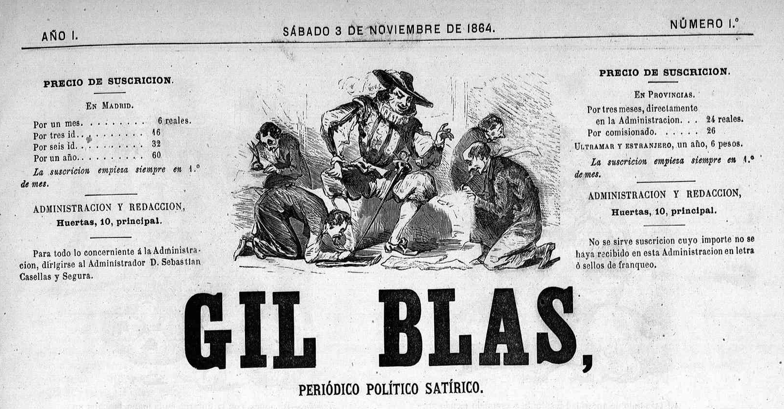 Cabecera de la revista Gil Blas, 3 de noviembre de 1864.